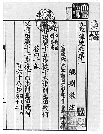 Représentation du livre de mathématiques chinoises : Les neuf chapitres